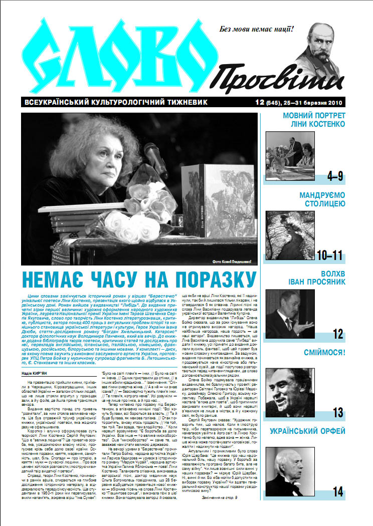 Газета «Слово Просвіти».